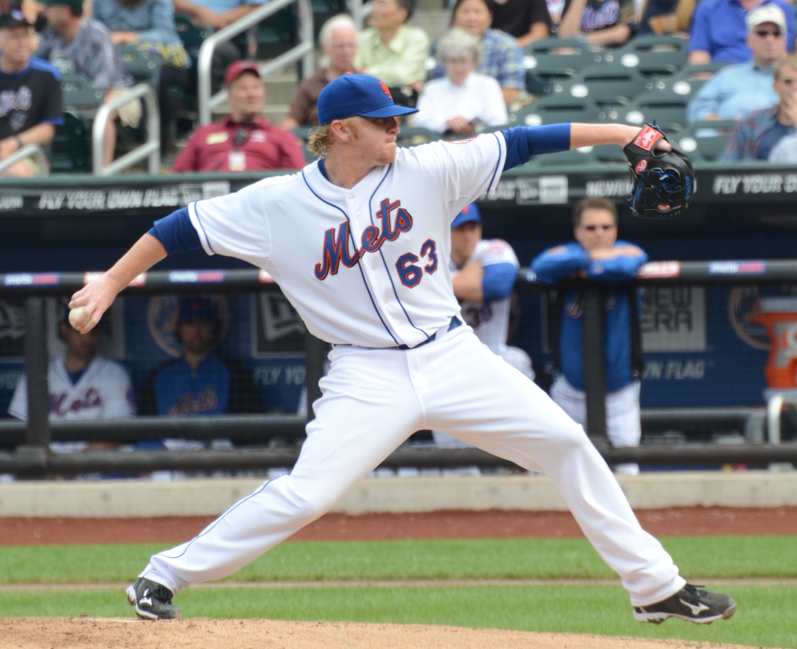 Chris Schwinden